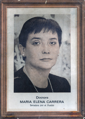 Afiche de la primera campaña como Senadora de María Elena Carrera.